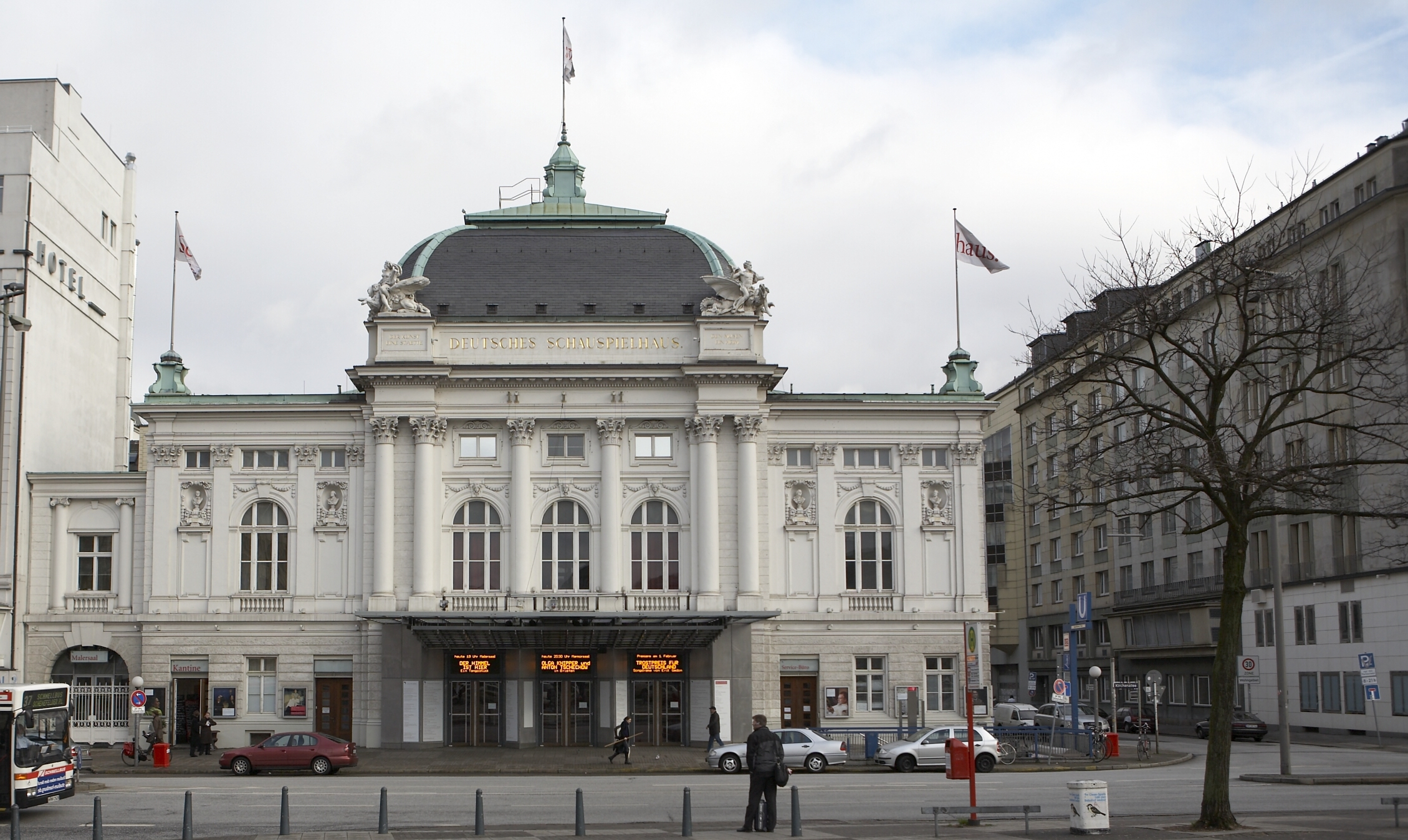 Hamburg, Deutsches Schauspielhaus, Vorderseite This is the photograph of an architectural monument. It is part of the list of cultural monuments of Hamburg, no. 618